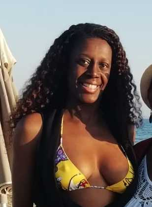 l'attrice italiana Sylvie Lubamba con la madre sulla spiaggia di Follonica